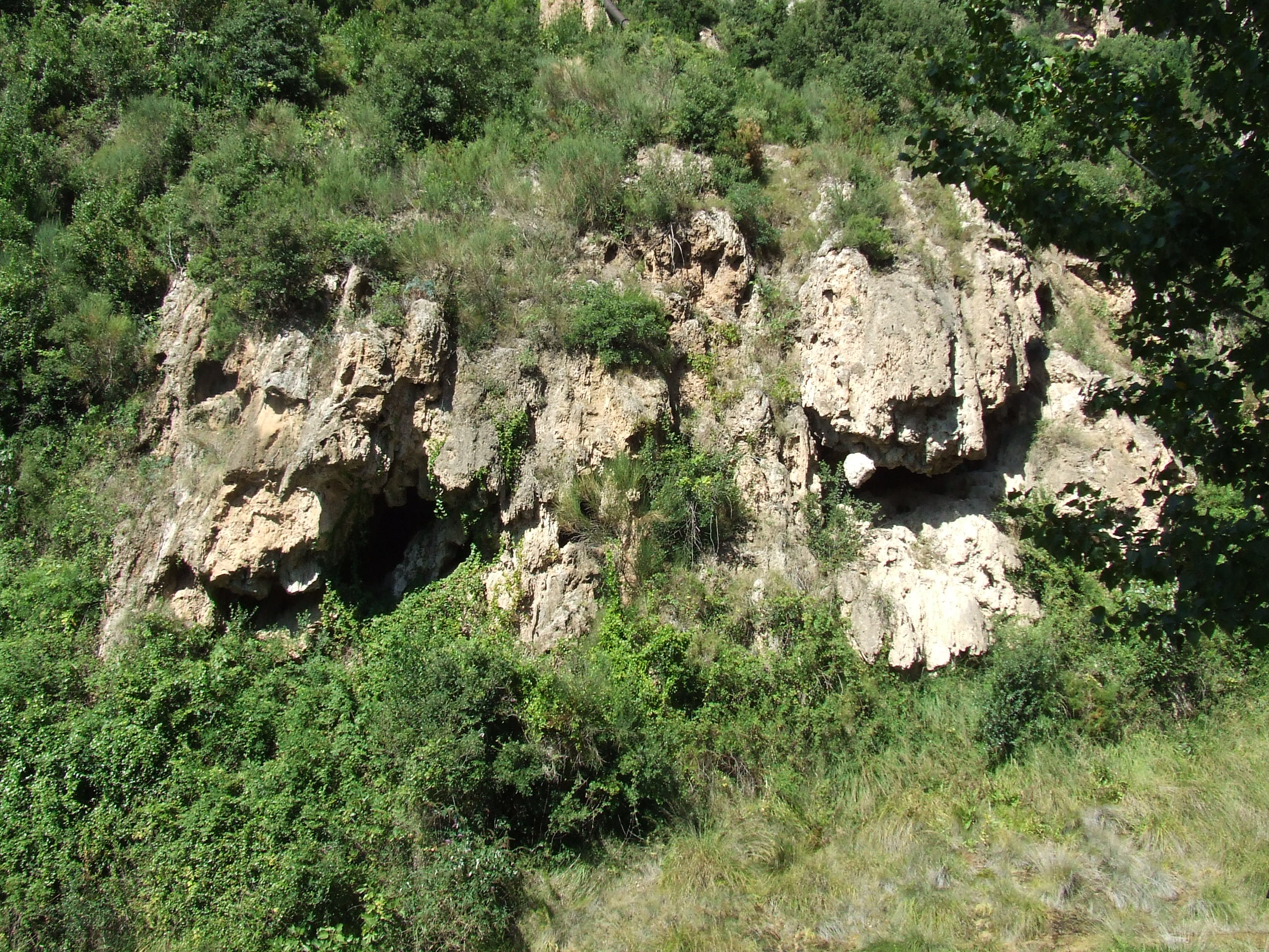 Travertí en formació al Tenes, a Riells del Fai (Vallès Oriental)